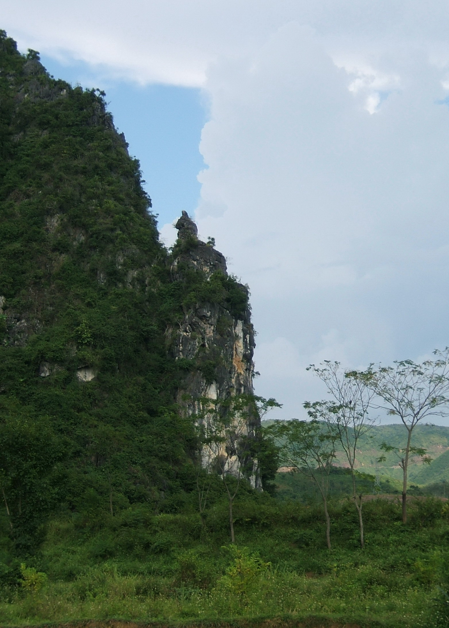 Liễu Thăng thạch (Đá Liễu Thăng, tương truyền khi bị tướng quân Ngô Phan chém bay đầu, Liễu Thăng đã hóa thành hòn đá quỳ cụt đầu tại Ải Chi Lăng). Ảnh Khương Việt Hà chụp và đóng góp tự nguyện cho vi.wikipedia.